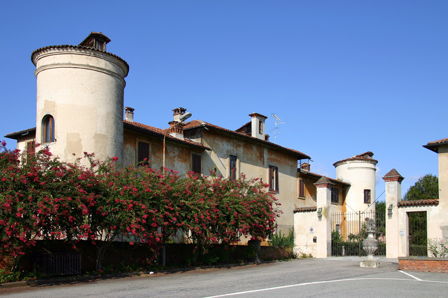 Il castello di Terdobbiate (NO)